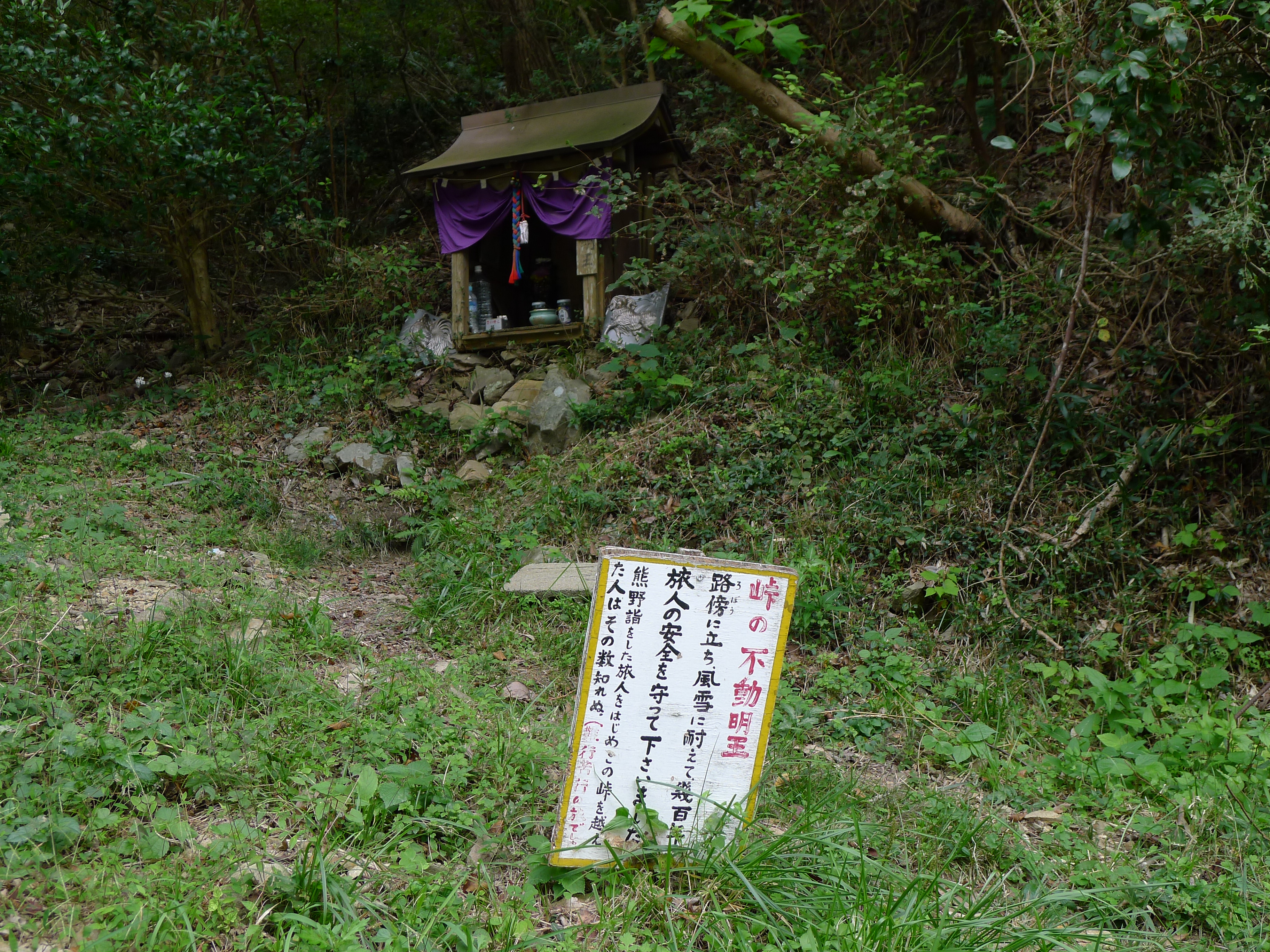 熊野古道紀伊路・紀州街道における和泉国と紀伊国の国境の雄ノ山峠にある不動尊